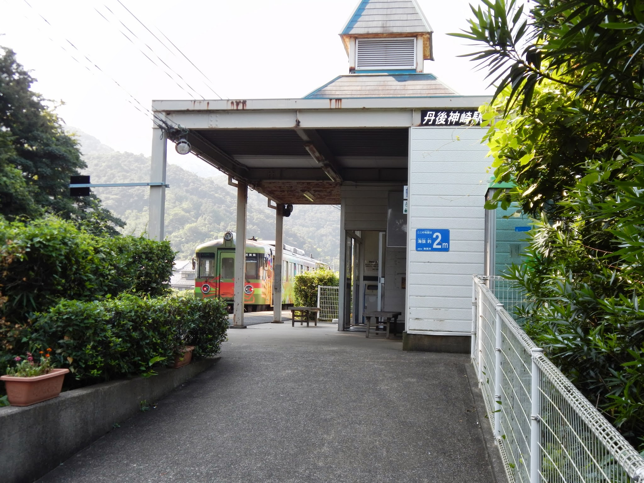 Yugo, Maizuru, Kyoto Prefecture 624-0963, Japan